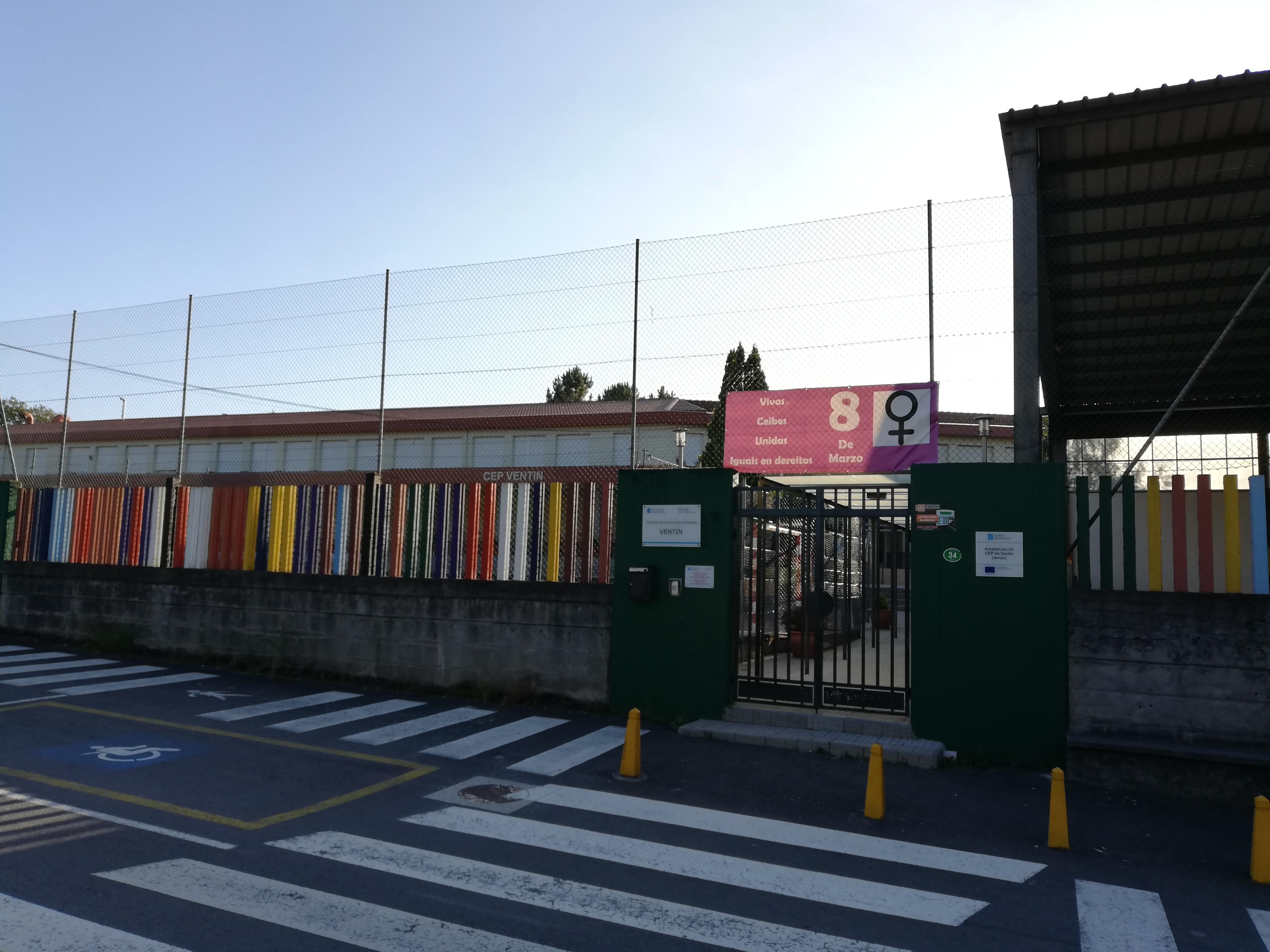 CEP Plurilingüe de Ventín, en Ames.